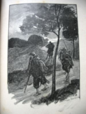 Illustration de Georges Jeanniot pour Le Calvaire, d'Octave Mirbeau (1848-1917).